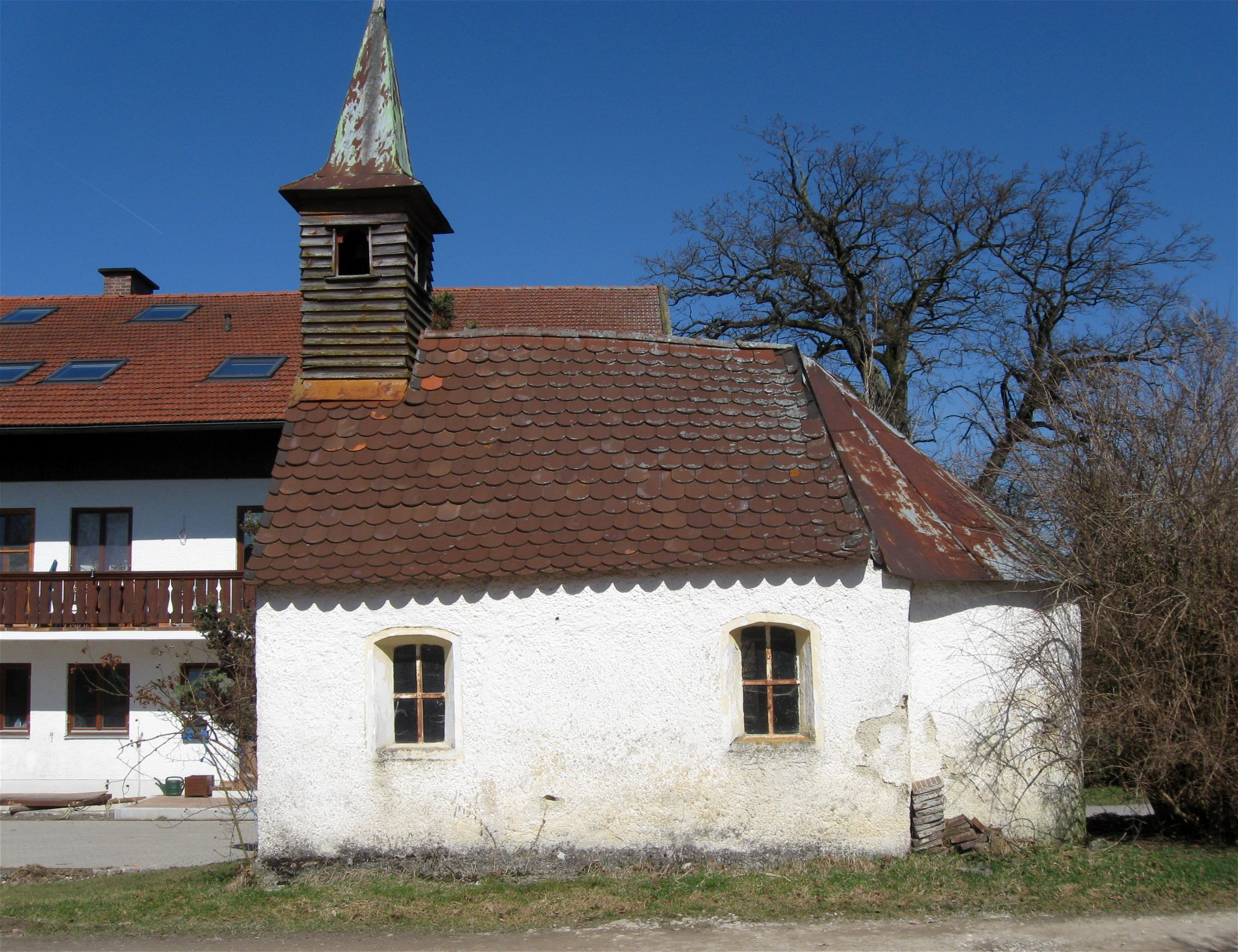 Gerblinghausen; Hofkapelle; mit Dachreiter, 1. Hälfte 18. Jh.; mit Ausstattung; bei Haus Nr. 2